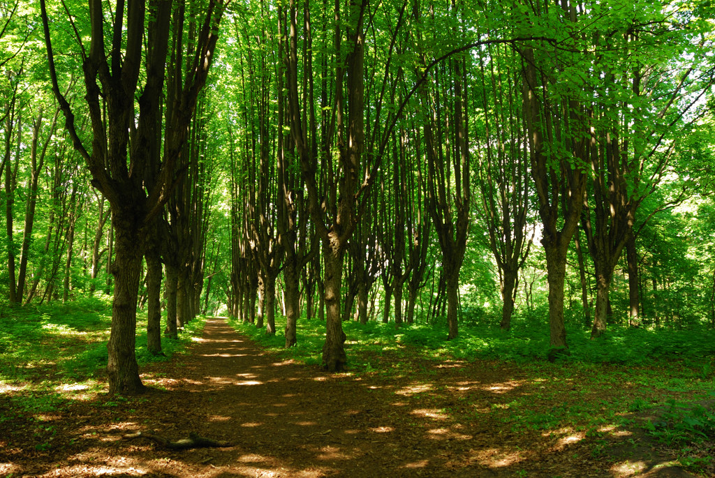 «Шарівський», Богодухівський район тубсанаторій «Шарівка» смт. Шарівка-1